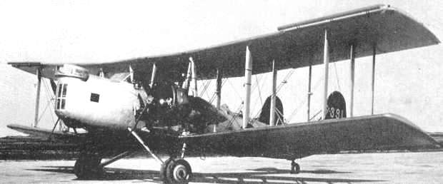 Mitsubishi 3MT5 twin tail variant.